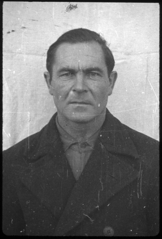 Sylvester Filleböck (* 16. Juni 1896; † unbekannt) war SS-Untersturmführer und als Versorgungsoffizier im KZ Dachau eingesetzt. Im Dachau-Hauptprozess wurde Filleböck zum Tode verurteilt, das Urteil später jedoch in 10 Jahre Haft umgewandelt.